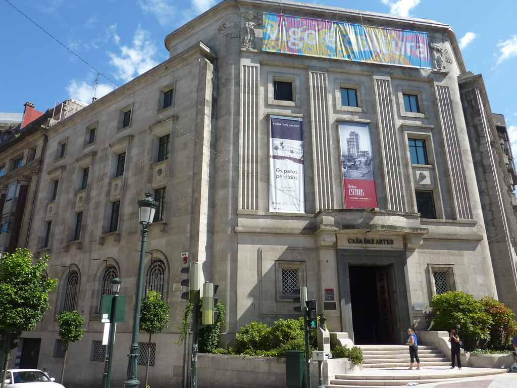 Vista general del edificio "Casa das artes" en cuyo interior, concretamente en la tercera planta, se encuentra la sede de la Fundación Laxeiro.